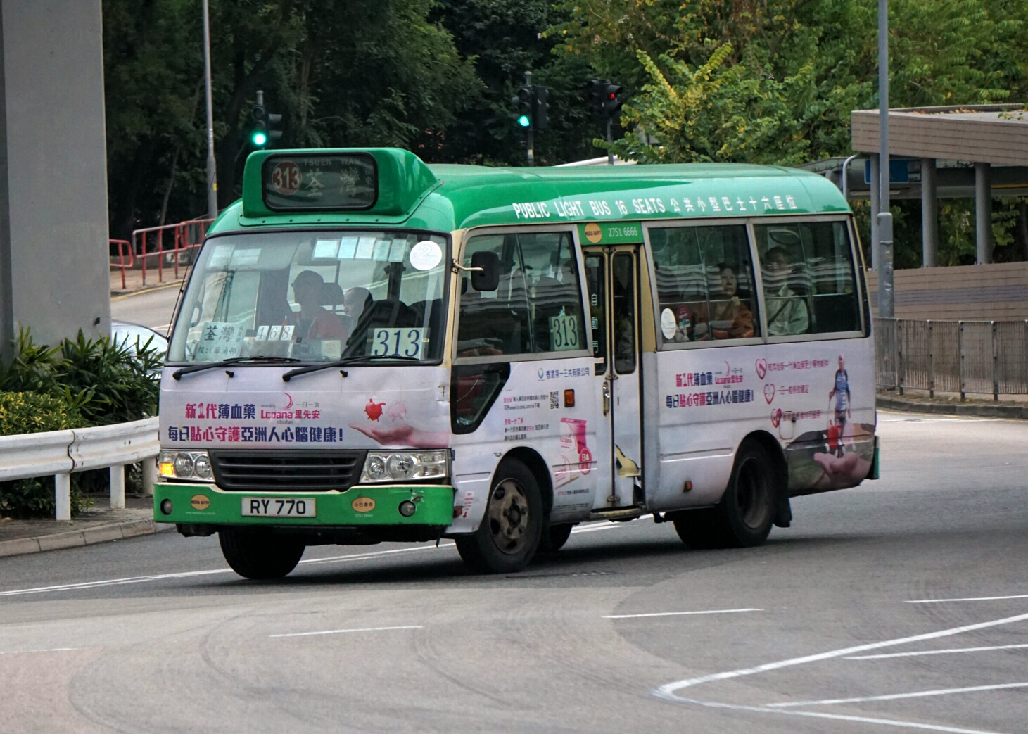 中文（香港）: 新界區專線小巴313線，正途經葵福路近貨櫃碼頭路交匯處